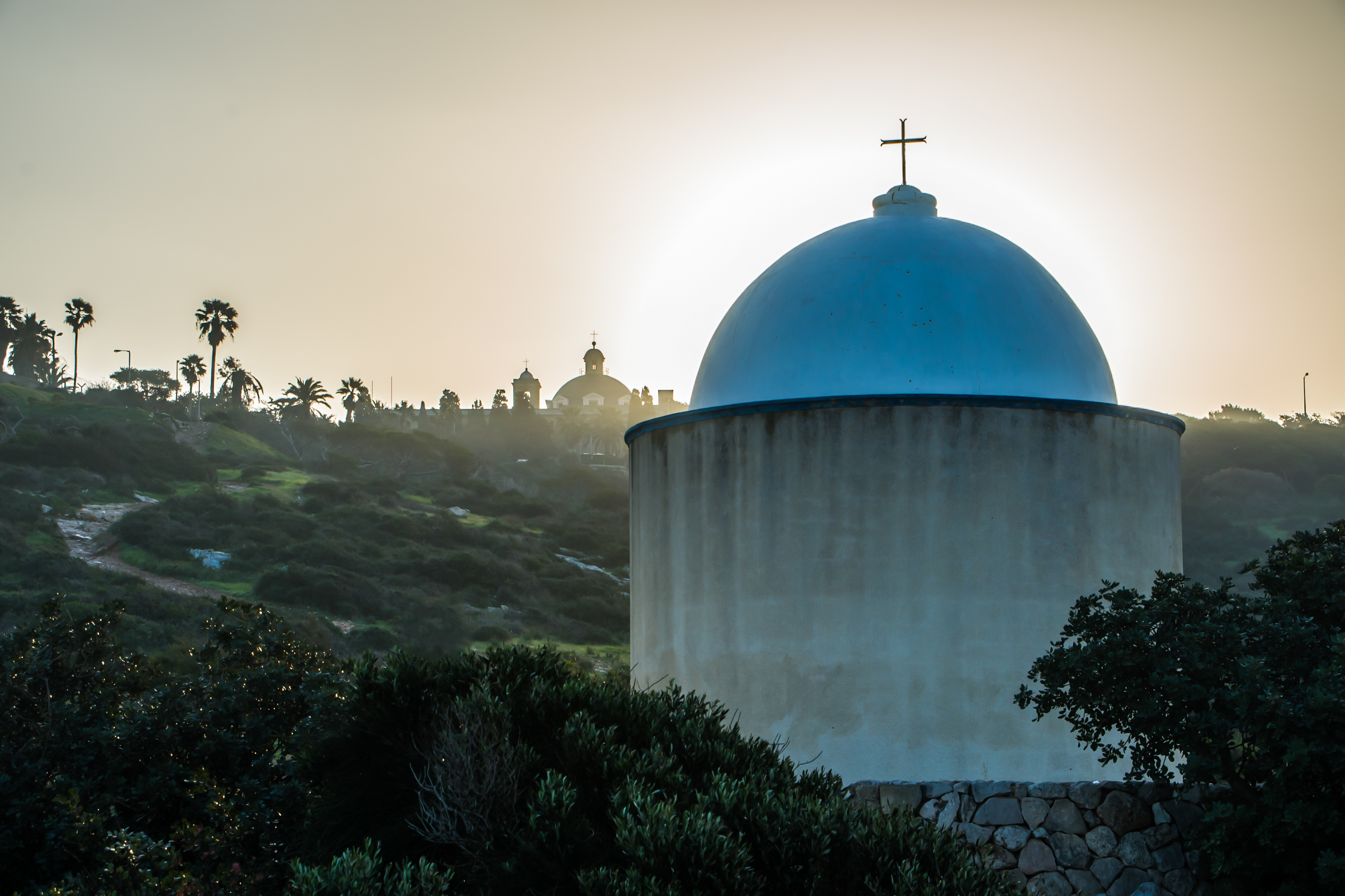 המנזר הכרמליתי (סטלה מאריס) בחיפה. סְטֶלָה מַארִיס (מלטינית: Stella Maris – "כוכב הים") הוא אזור בראש הכרמל ובו מתחמים של מנזר וכנסייה בני מאות שנים, קפלות ושאר בניינים השייכים למסדר הכרמליתי. המושג "כוכב הים" במסורת הנוצרית הקתולית הוא אחד האספקטים של הבתולה הקדושה, שבהקשר זה מוצגת כקשורה במיוחד אל הים ומגוננת על יורדי ים, מלחים ודייגים. המסדר הכרמליתי נוסד במקורו על הר הכרמל בתקופת ממלכת הצלבנים בידי נזירים שחיו במערות בהשראת אליהו הנביא. המסדר שגשג והתרחב משם לרחבי אירופה.